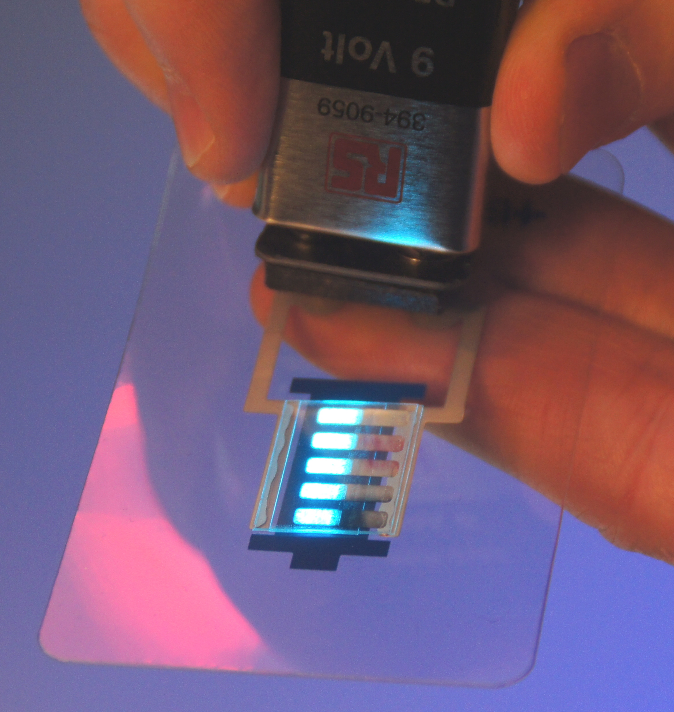 Von den Entwicklungslabors der Heidelberger Druckmaschinen AG gedruckte OLEDs, gezeigt auf der Drupa 2012